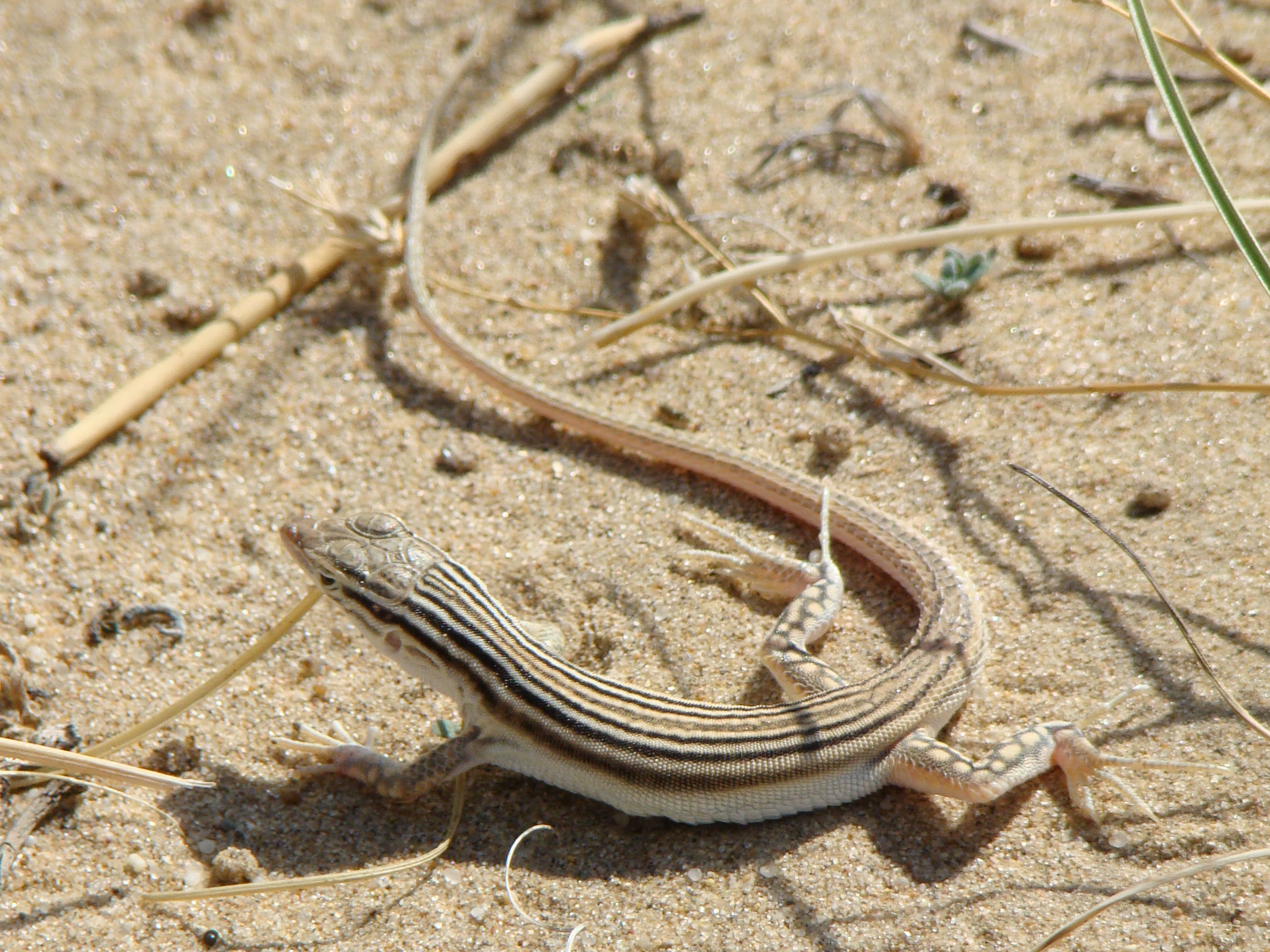 Линейчатая ящурка (Eremias lineolata). Окрестности города Байконур, левый берег Сырдарьи.